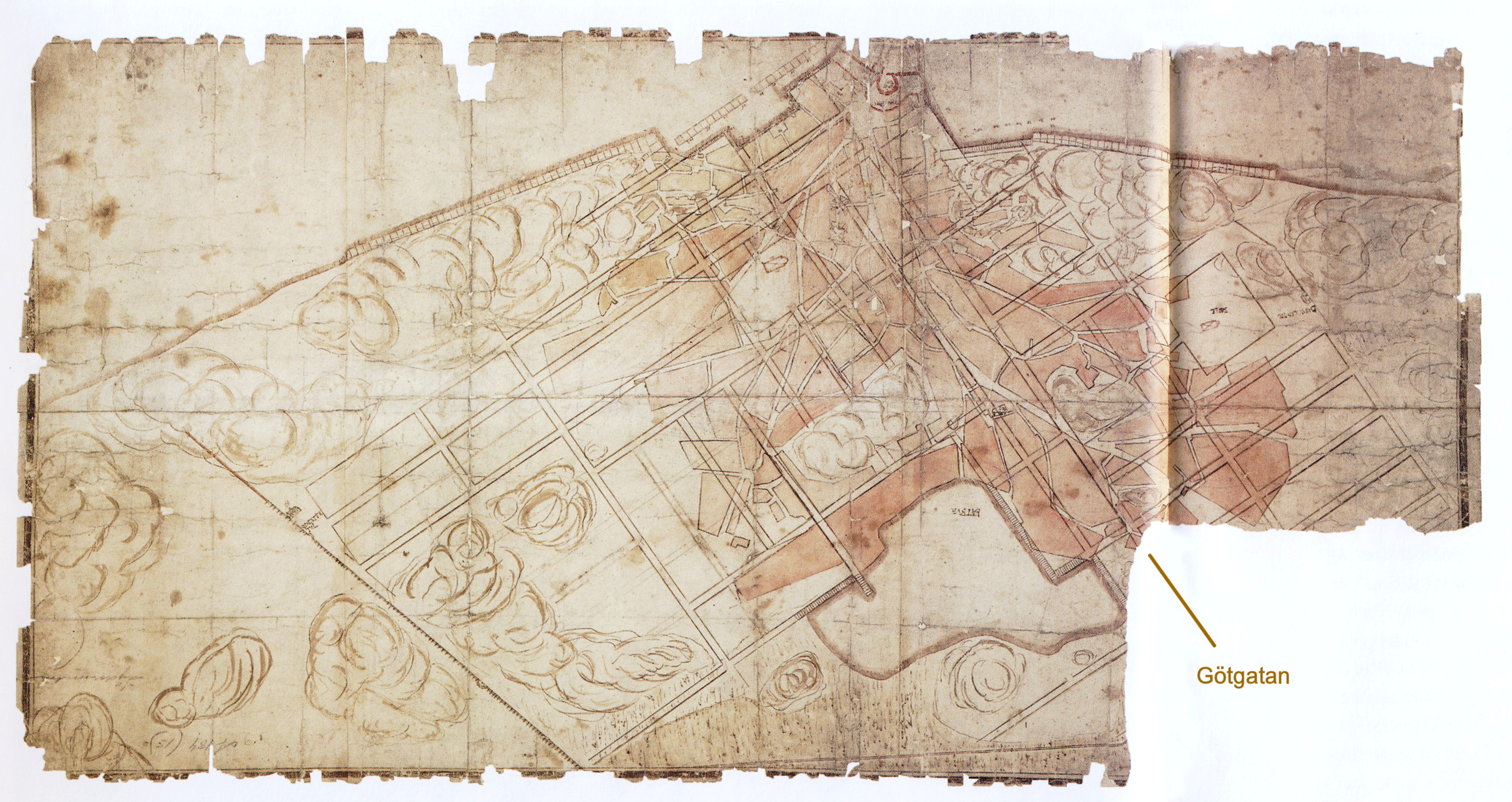 Regleringsplan över Södermalm